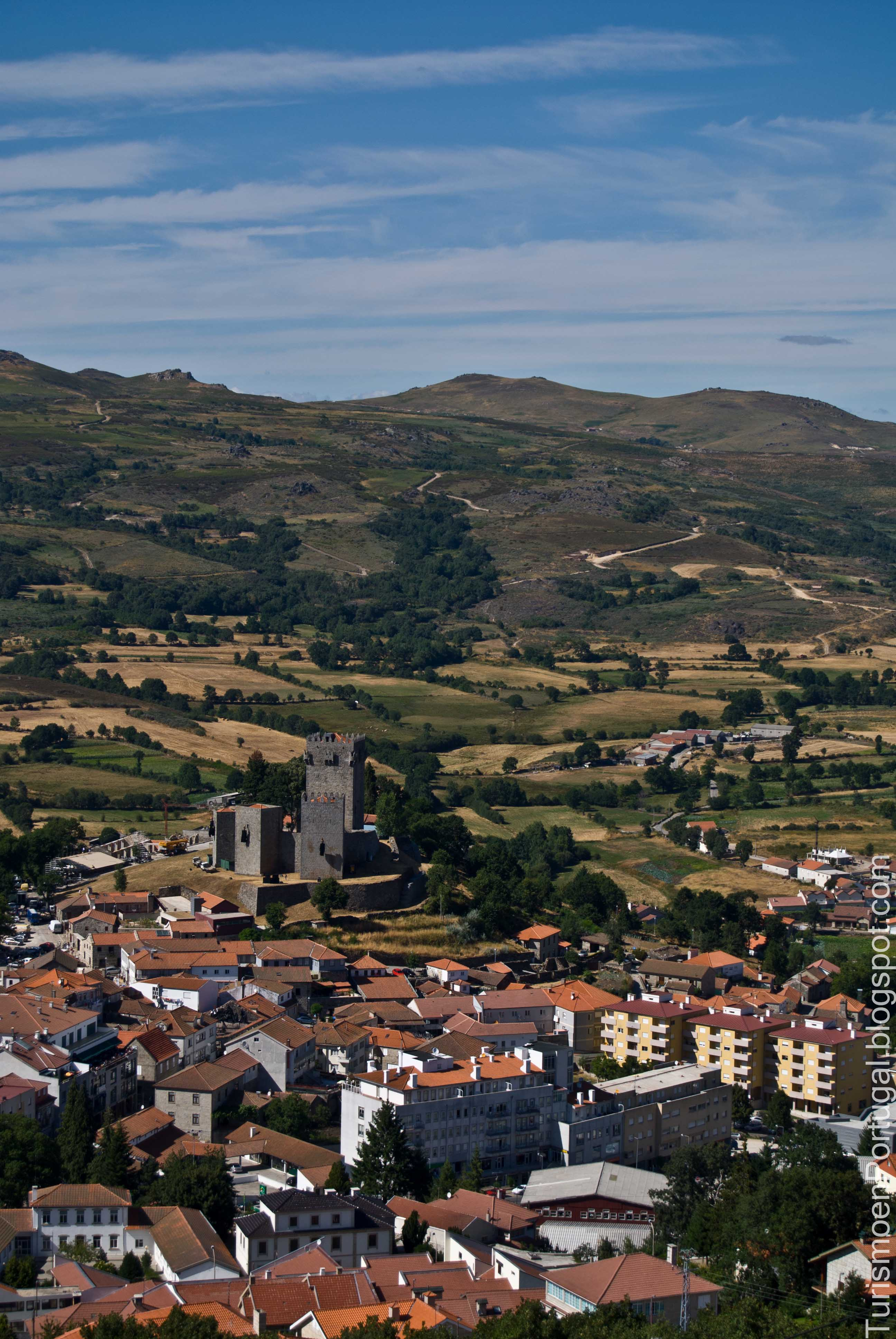 A vila de Montalegre dende o Alto da Curujeira